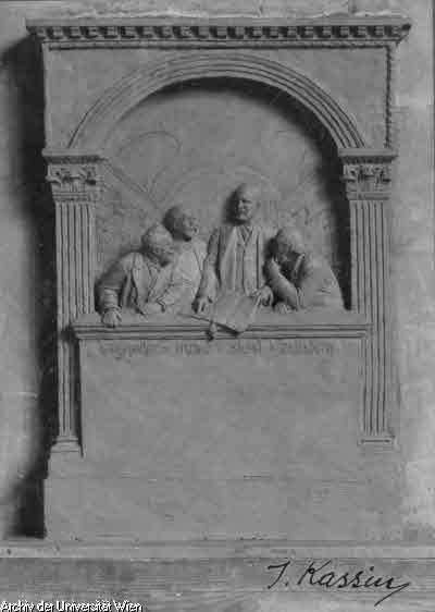 Schwarzweißfoto (10,3 x 14,5 cm) eines Denkmalsentwurfs für den Arkadenhof der Universität Wien; Gruppendenkmal für die Historiker Theodor von Sickel (1826–1908), Alfons Huber (1834–1898), Engelbert Mühlbacher (1843–1903) und Heinrich von Zeißberg (1839–1899)